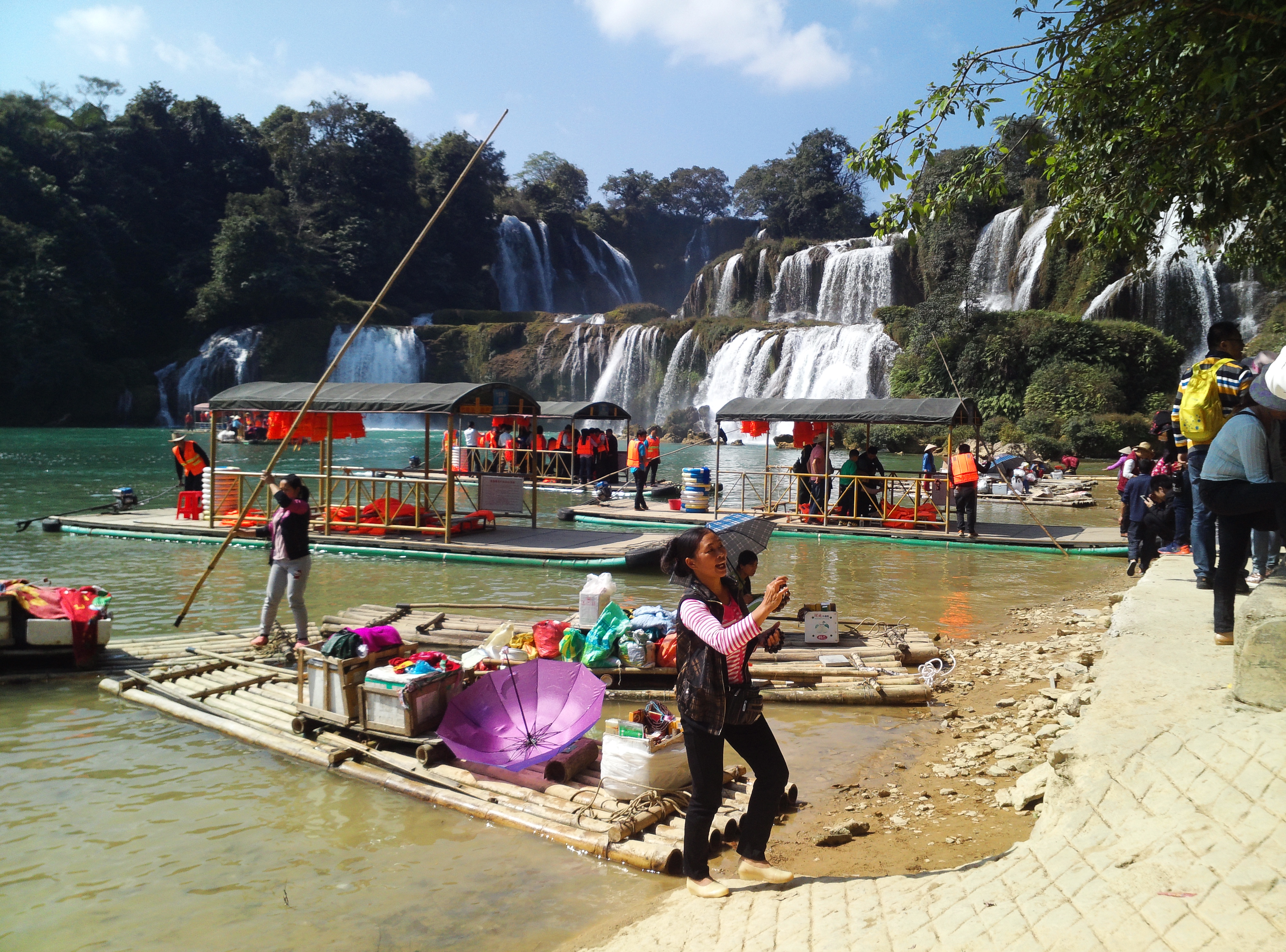 越南小販在中國邊境向中國旅客兜售貨物